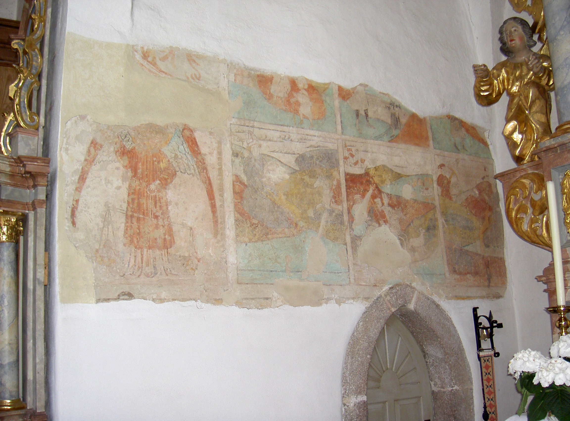 Altenstadt, Simultankirche St. Johannes Baptist